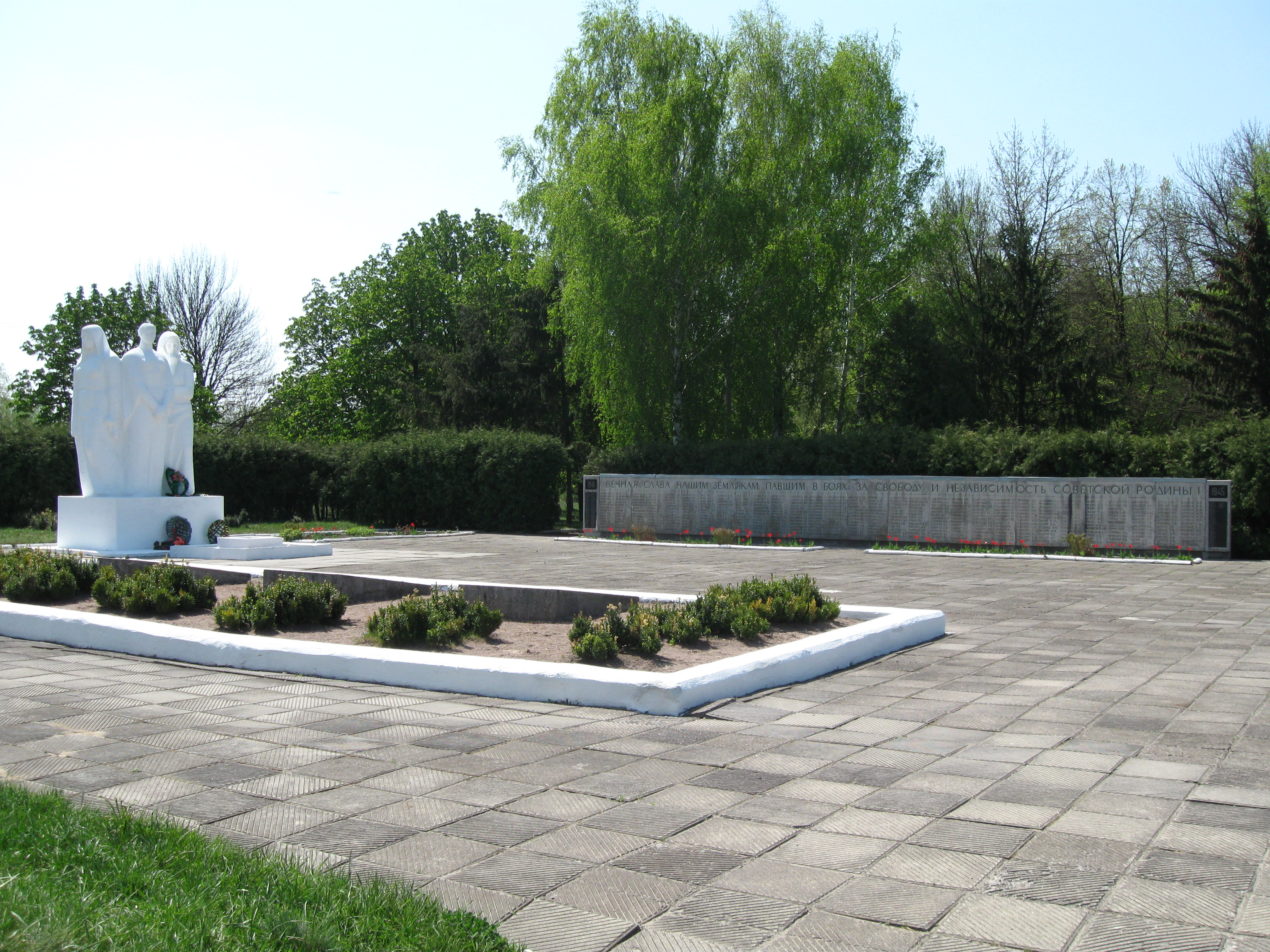 Загальний вид на братську могилу в центрі смт. Липова Долина